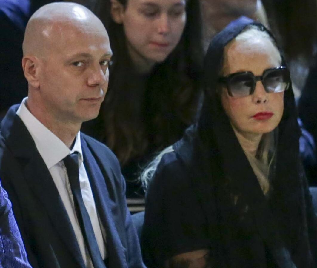 Церемония прощания с Иосифом Давыдовичем Кобзоном